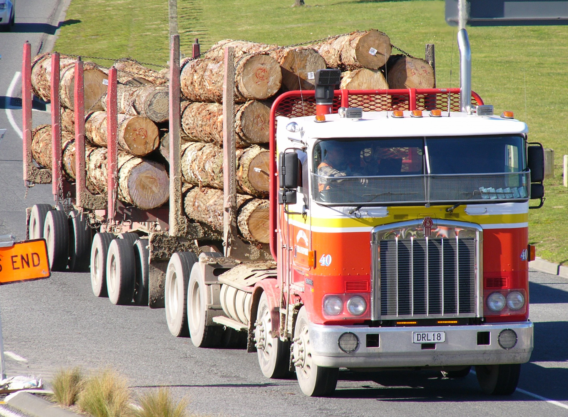 2007 Kenworth K